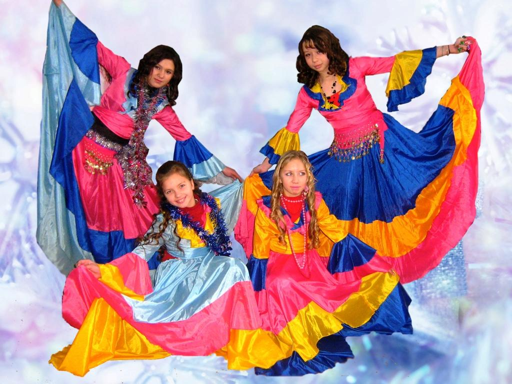 Чӑвашла: ташăçсем, танцовщицы, ярапайкасы. ярабайкасы